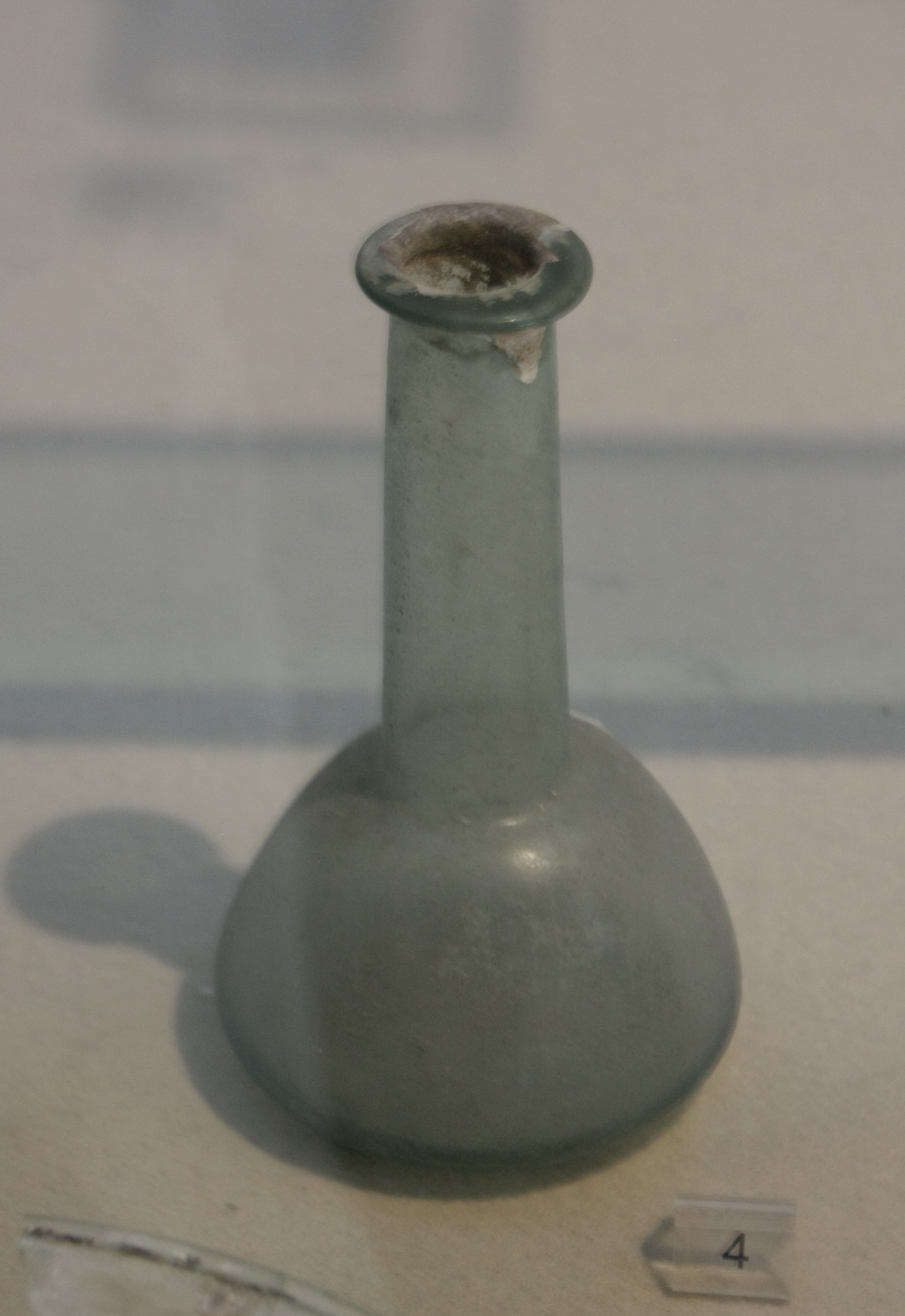 Ampolla a bulbo in vetro da Akradina I-II sec d.C.